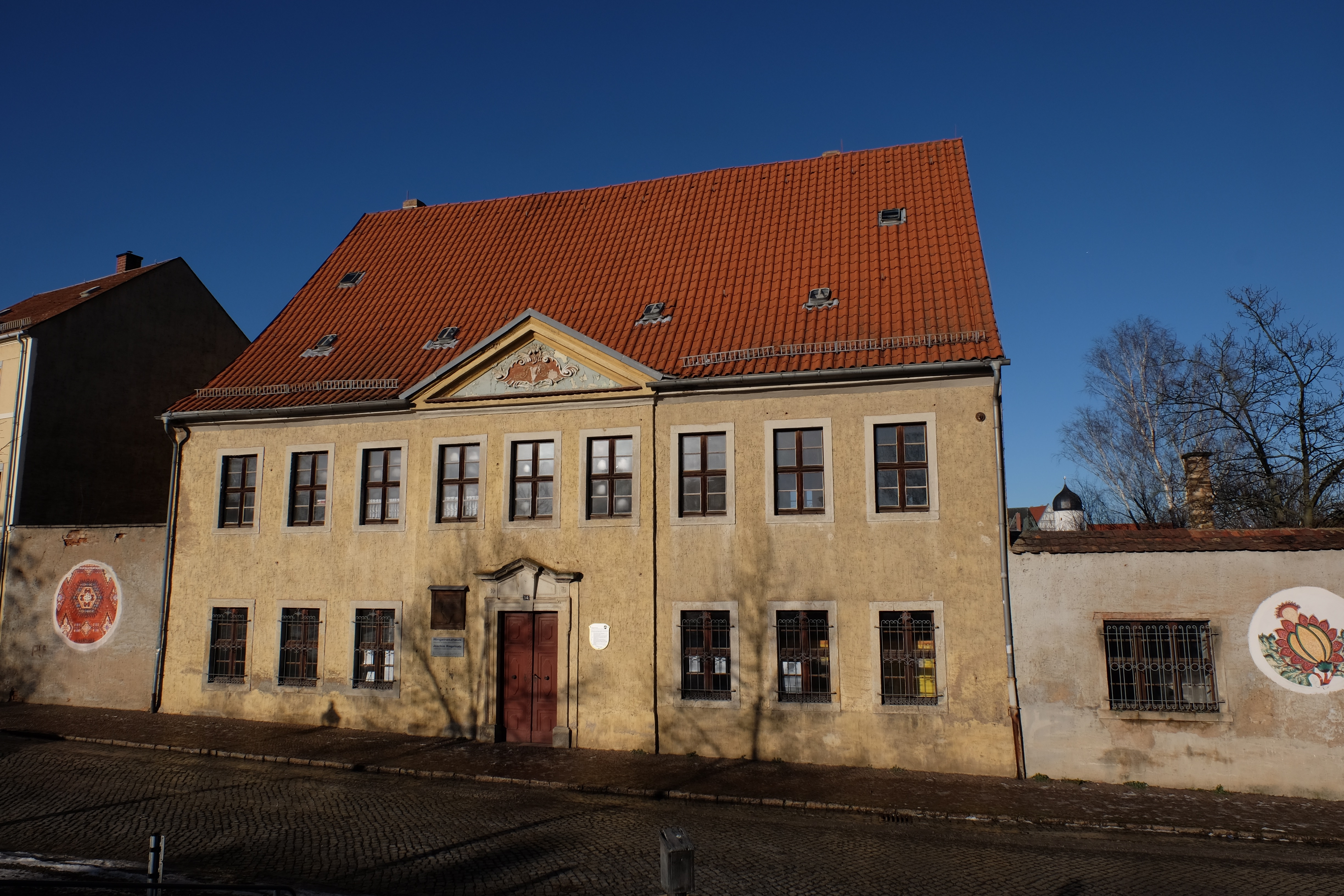 Ringelnatz-Geburtshaus im Januar 2016 - zeigt den derzeitigen Zustand